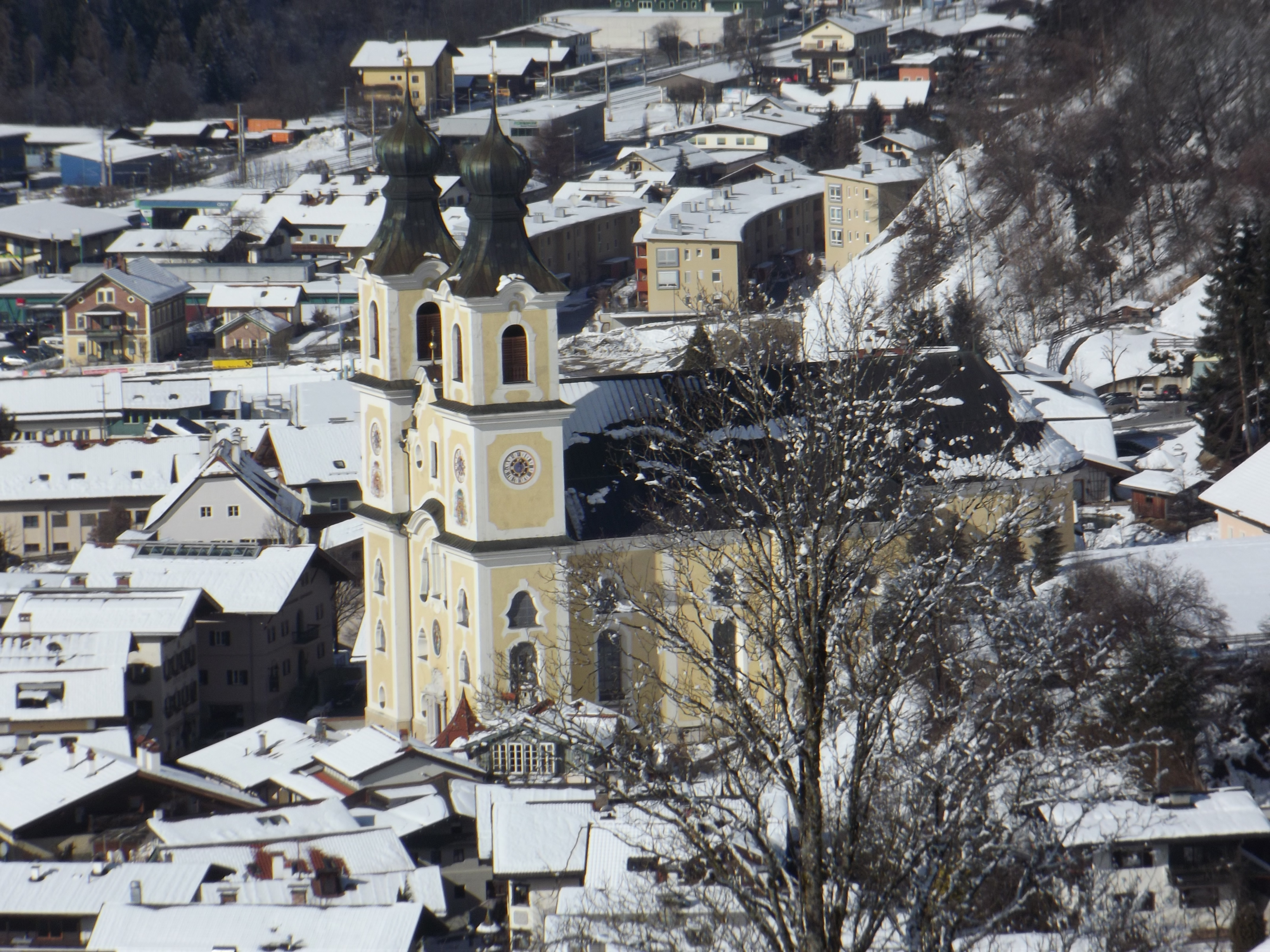 Hopfgarten im Brixental, Österreich: Kirche, vom Berg aus fotografiert